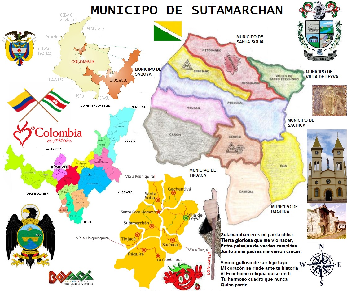 Ubiación donde esta el Mejor Clima del Mundo